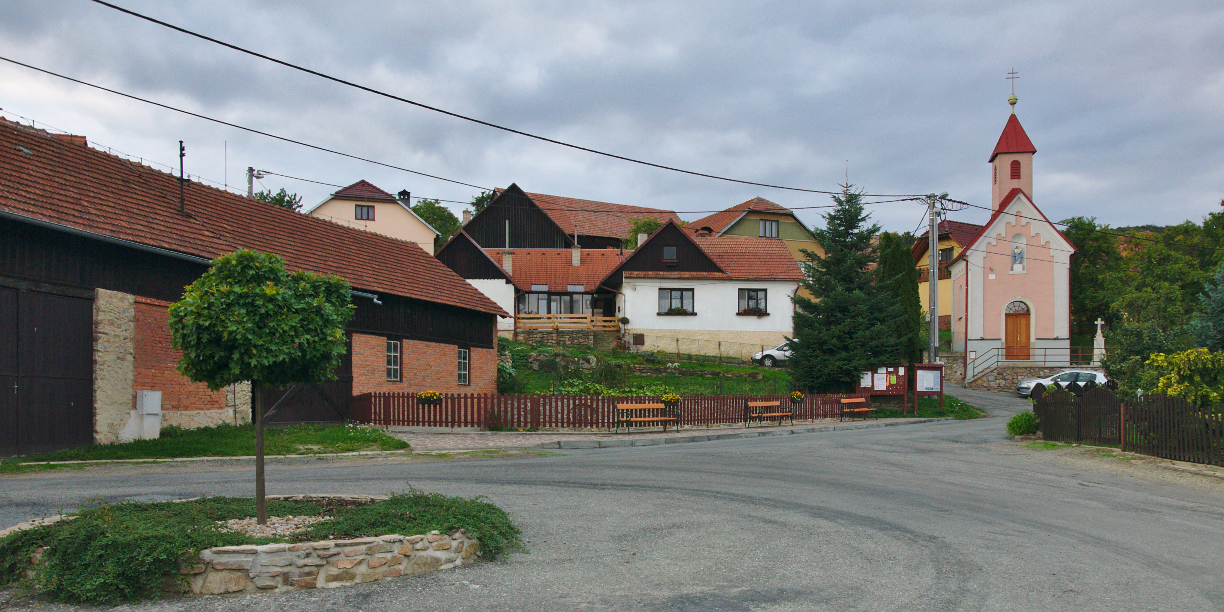 Náves, Synalov, okres Brno-venkov